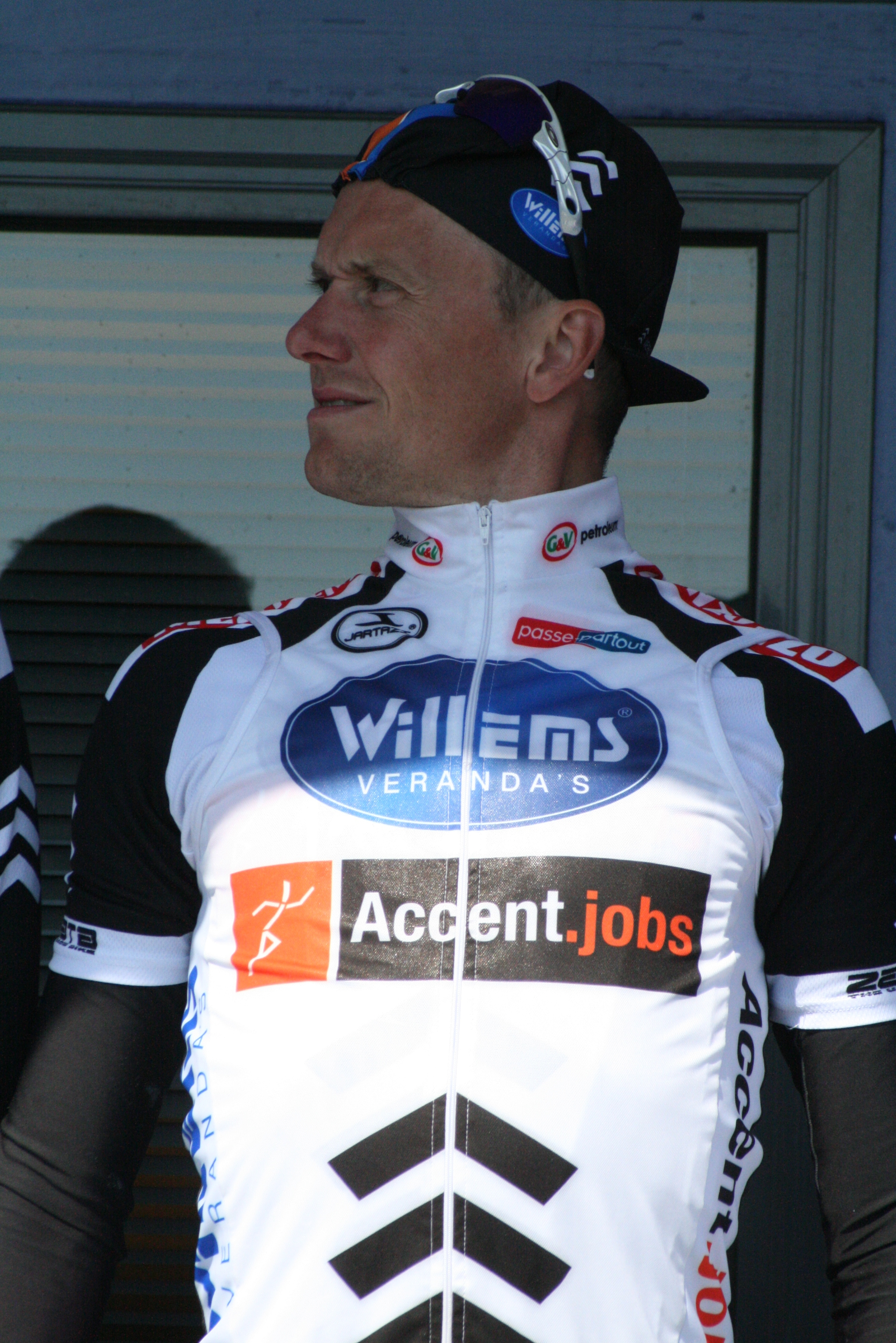 Présentation des coureurs au départ de la première étape James Van Landschoot